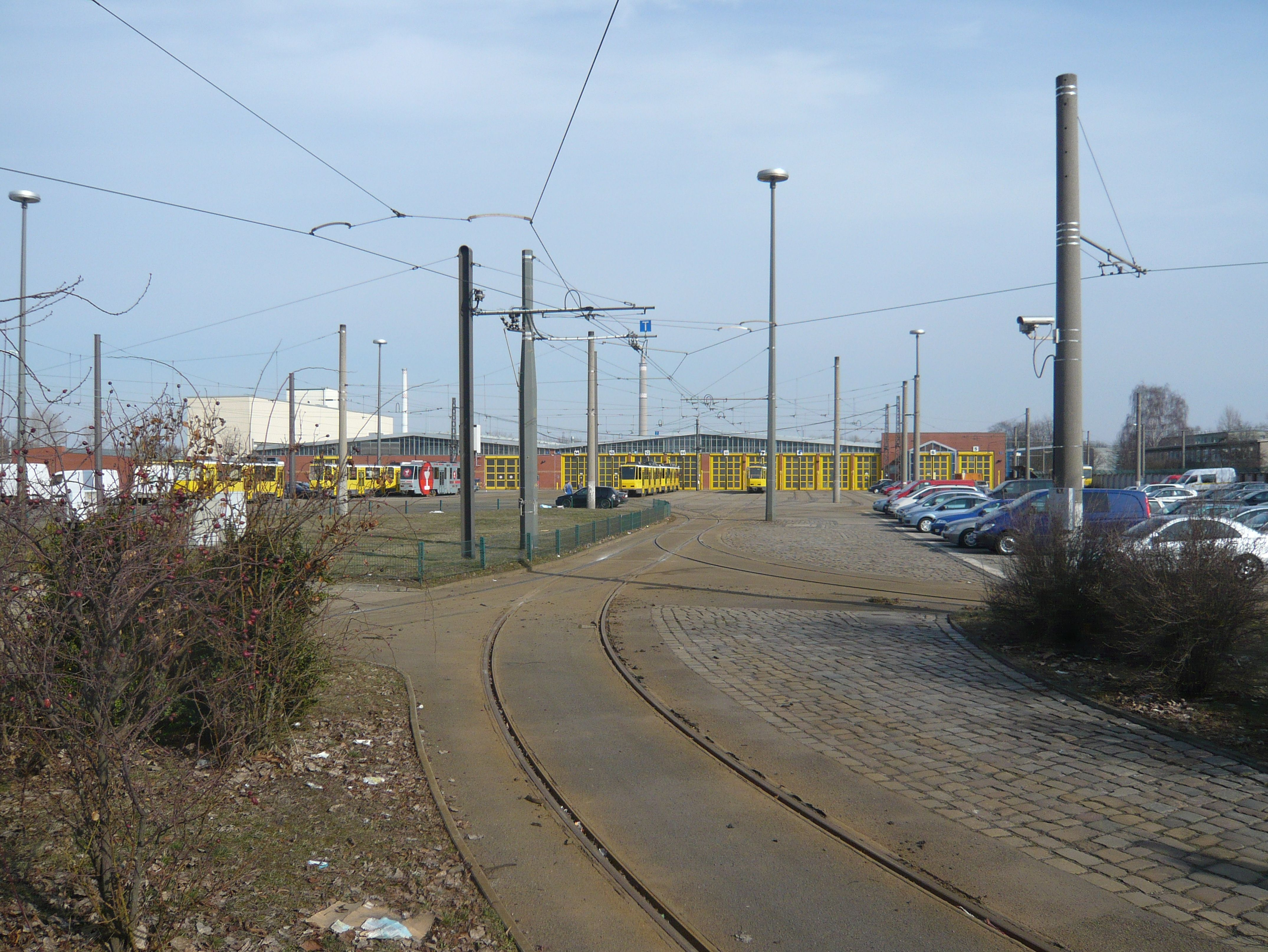 Straßenbahnhof Siegfriedstraße